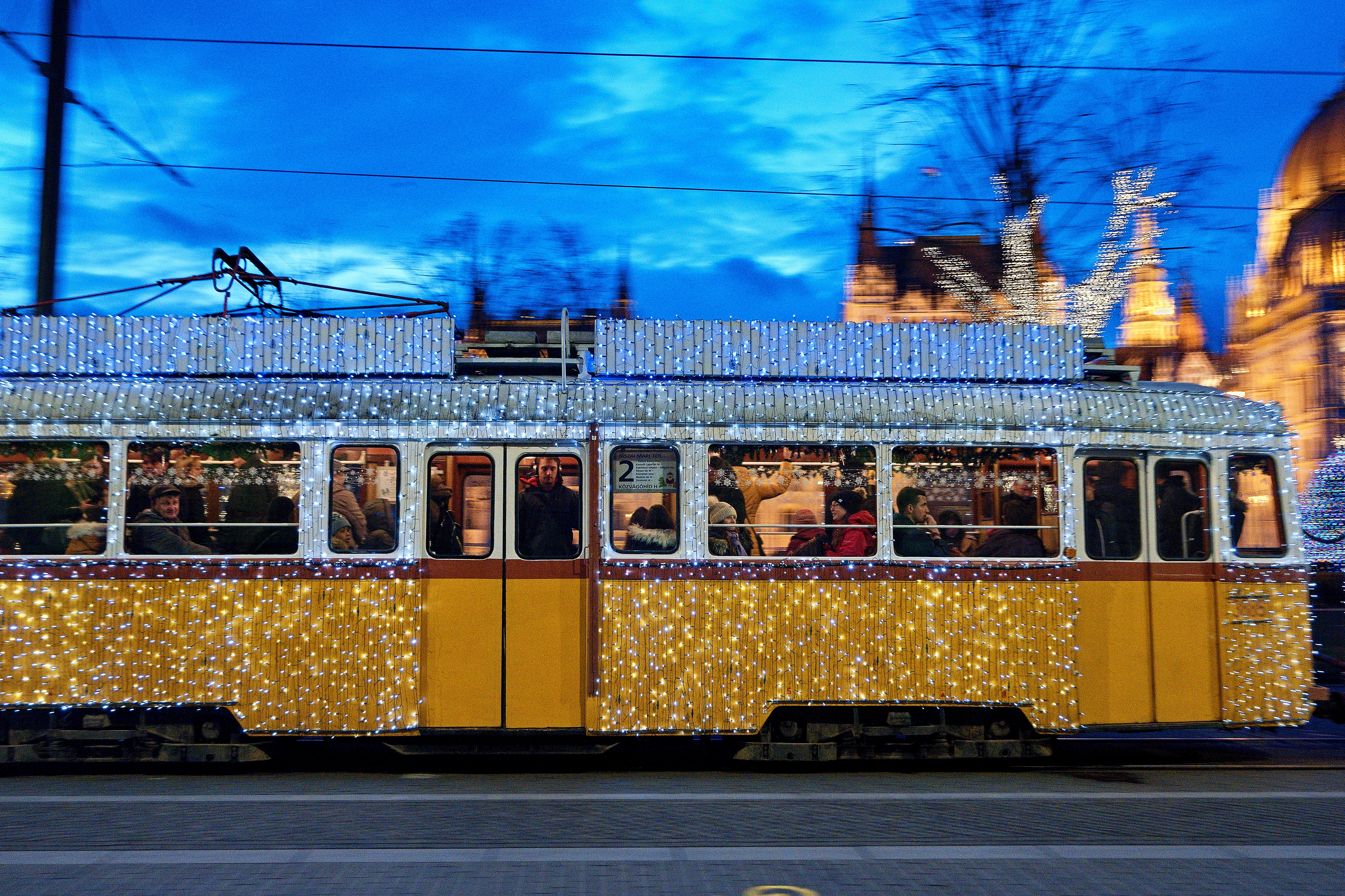 Tramvaj číslo 2 na trase u parlamentu v Budapešti v průběhu vánočních svátků.